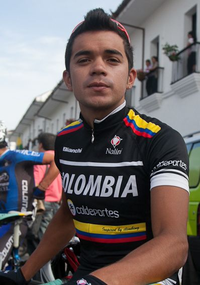 Ciclista colombiano Fabio Duarte, en la Vuelta a Colombia 2012